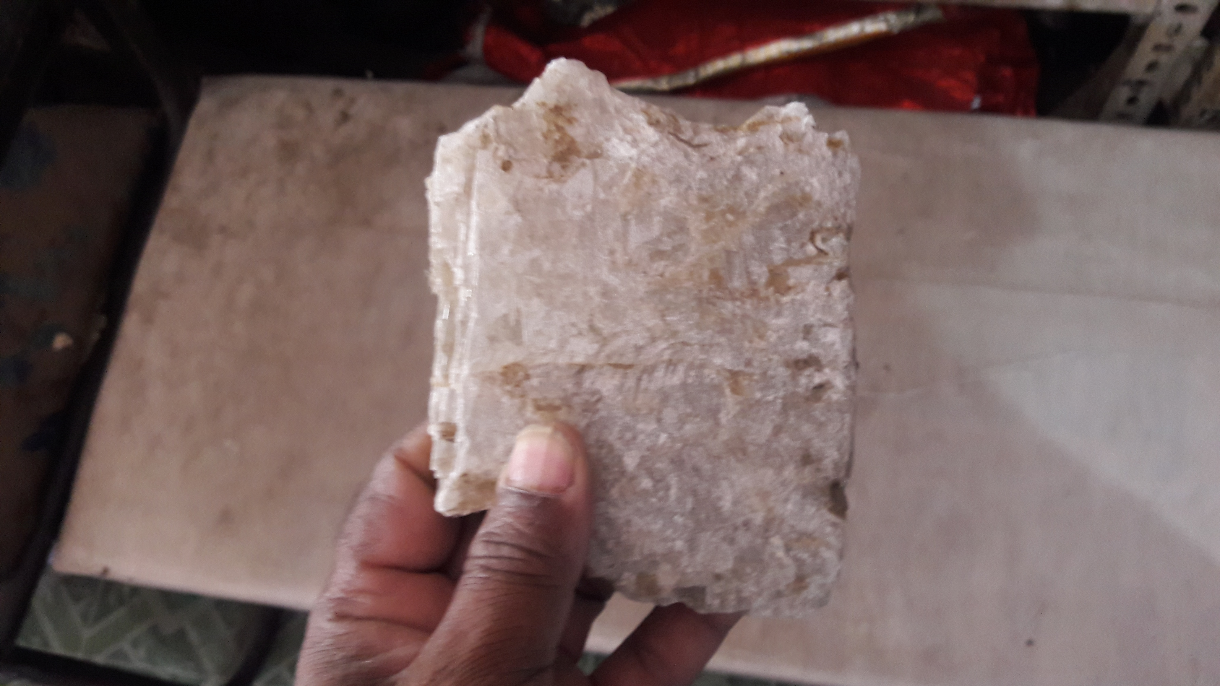 മലപ്പുറം ജില്ലയിലെ പൊന്നാനി താലൂക്കിൽ പുതിയിരുത്തി എന്ന സ്ഥലത്ത് ഒരു ആയൂർവേദ കടയിൽ വില്പനയ്ക്ക് വെച്ചിരിക്കുന്ന കന്മദം.